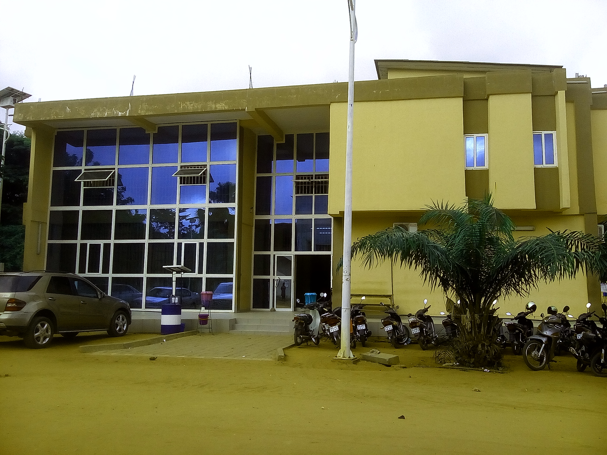 FASH-UAC